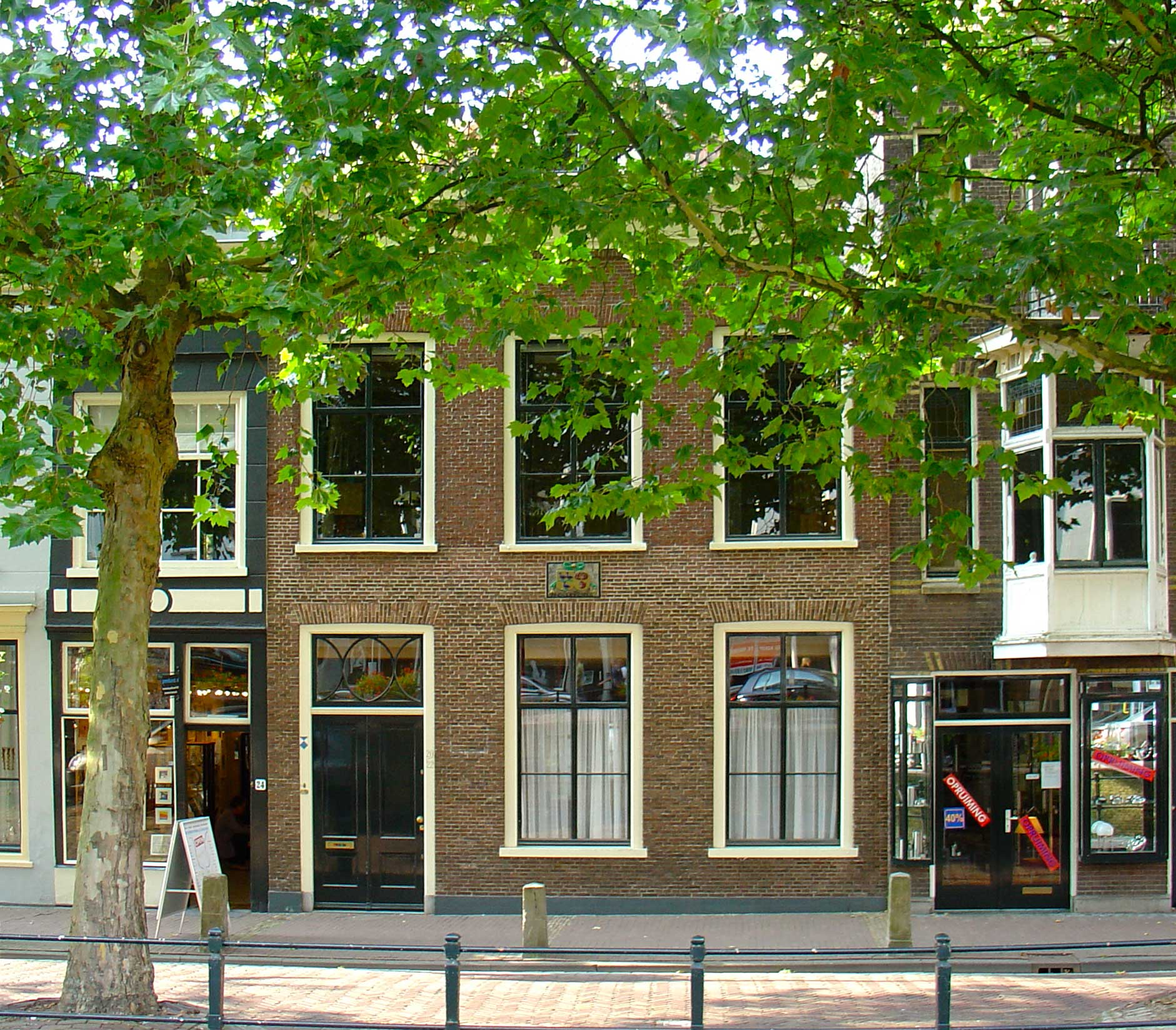 "De vergulde galei" Lage Gouwe 20-22 te Gouda